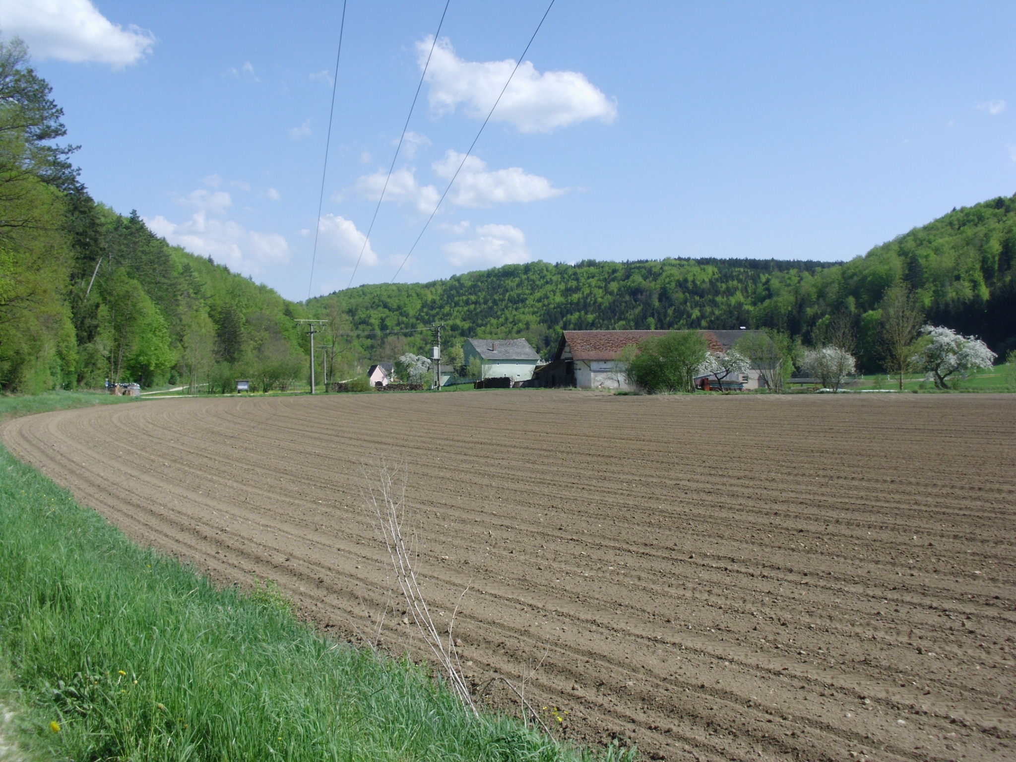 Eibwang, Ortsteil von Kinding im Landkreis Eichstätt (Bayern)